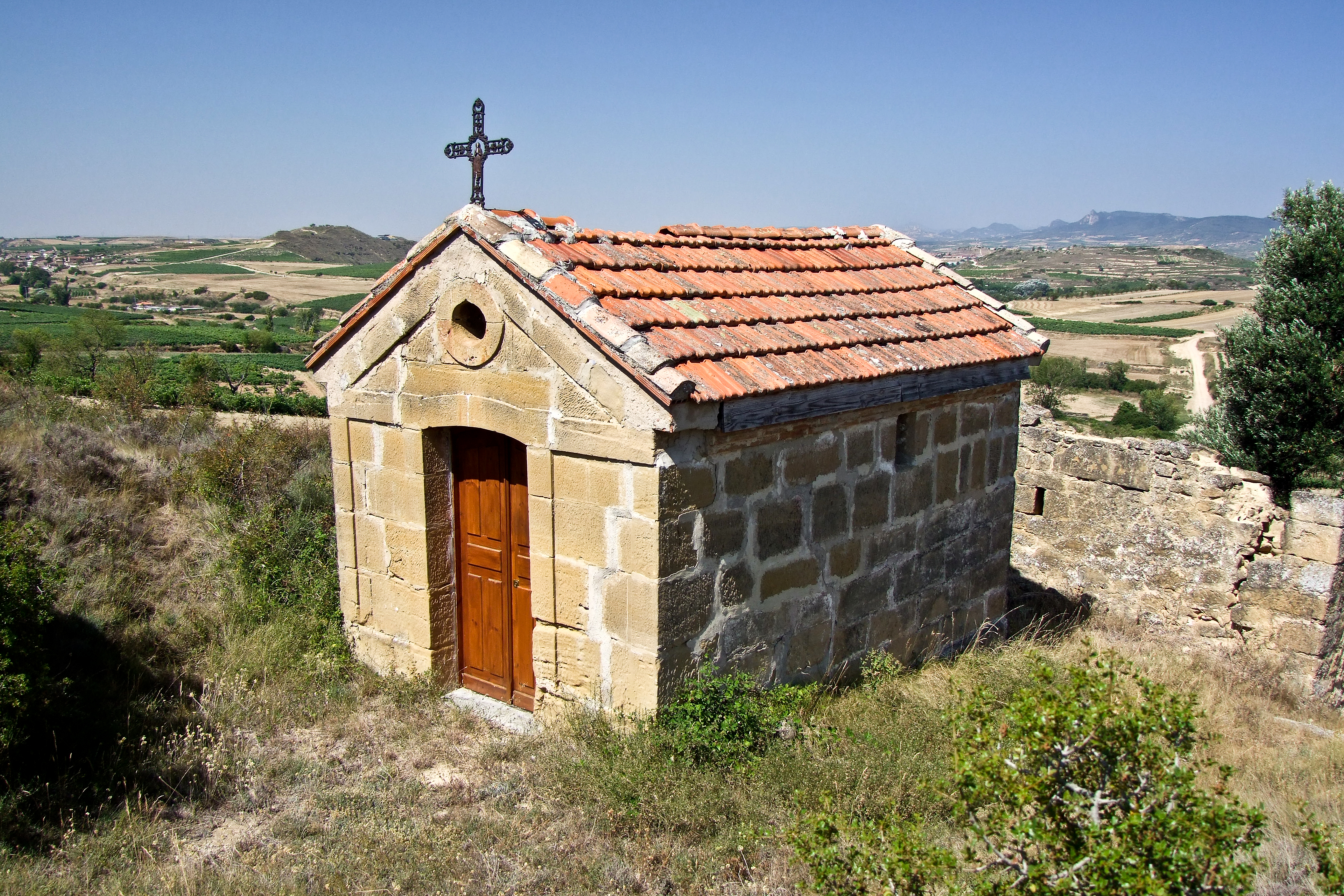 Ermita del Calvario en la localidad de Briones, La Rioja - España